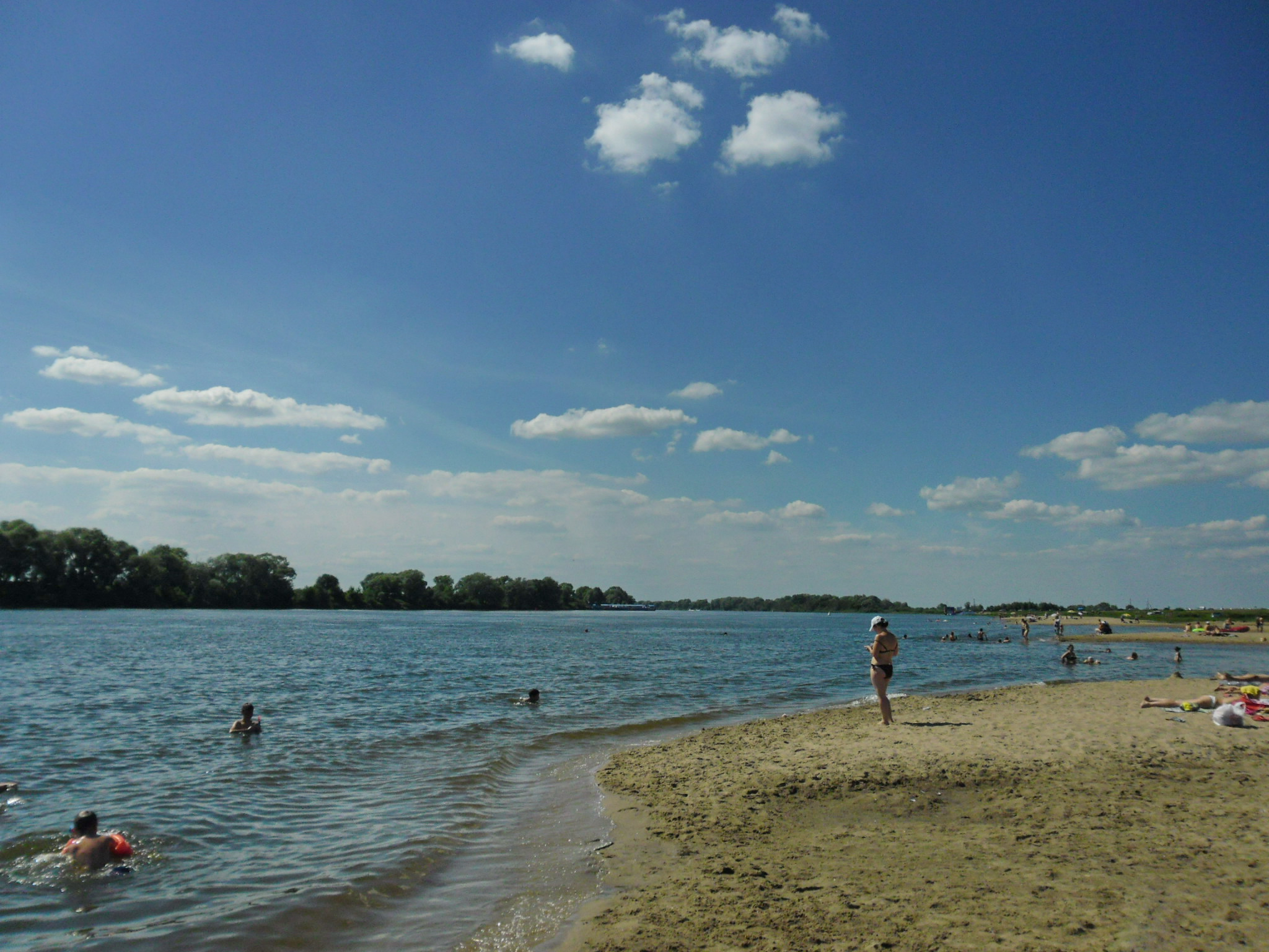 Beloomut, Moskovskaya oblast', Russia, 140520